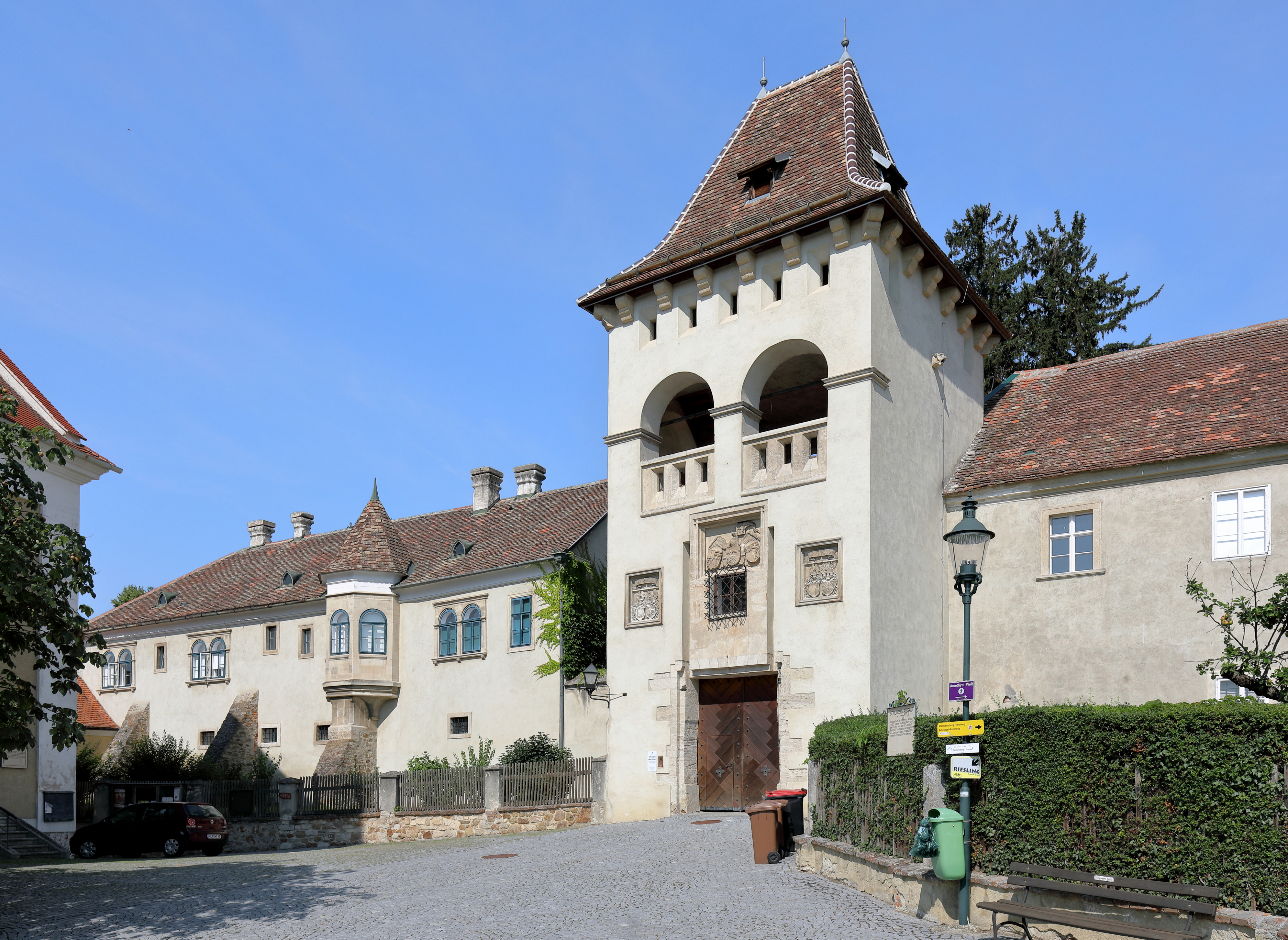 Ostansicht der Vorburg des Schlosses bzw. der Burg Maissau in der niederösterreichischen Stadtgemeinde Maissau.Der Torturm wurde 1879 anstelle eines frühneuzeitlichen (?) Vorgängerbaues errichtet. Flankiert ist er von zweigeschossigen Wirtschaftstrakten, die aus dem 17. Jahrhundert stammen, wobei der westliche 1896 umgebaut wurde.